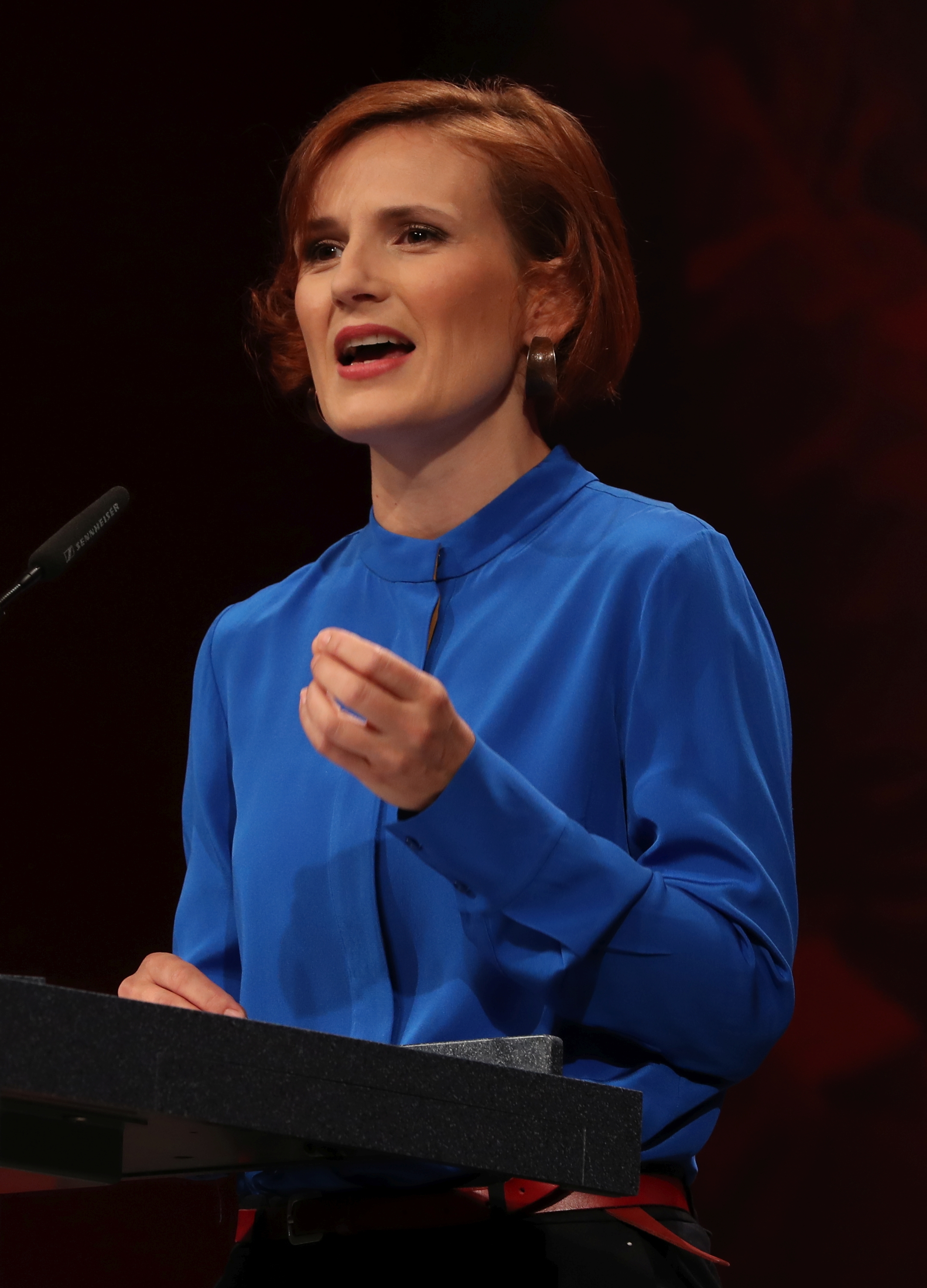 Bundesparteitag Die Linke 2018 in Leipzig